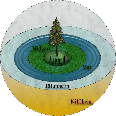 esquema del universo según la mitología nórdica. primera versión. creada por --† Escalda † 01:50 28 may, 2005 (CEST) para libre distribución. Categoría:Esquemas (imagen)